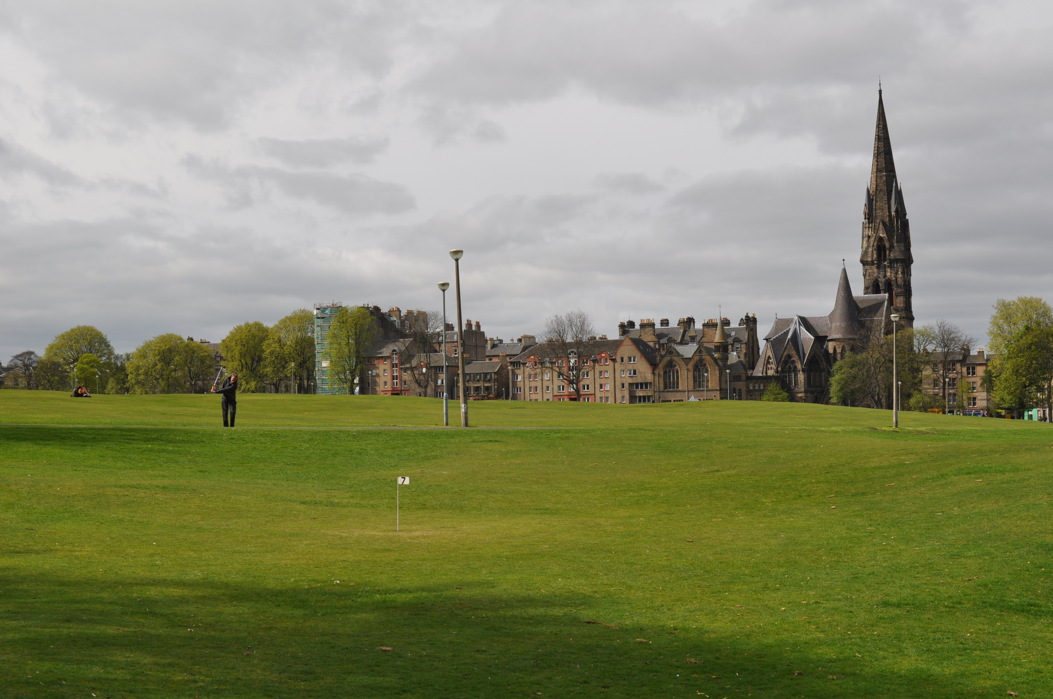 Bruntsfield Links, Edinburgh.